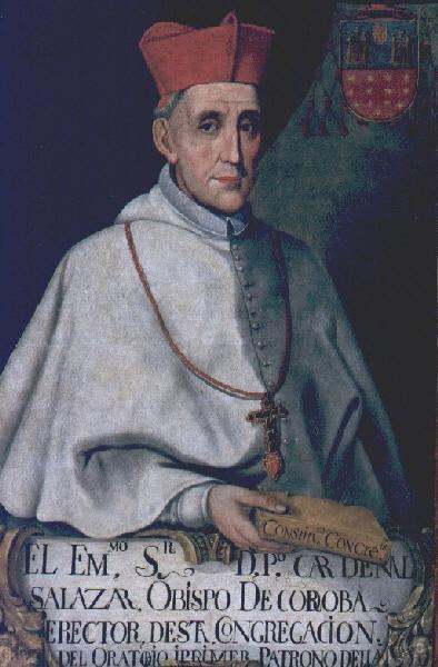 Retrato del prelado Pedro de Salazar Gutiérrez de Toledo (1630-1706), que llegó a ser cardenal de la Iglesia Católica y obispo de Salamanca y posteriormente de la ciudad de Córdoba, donde falleció en el año 1706. Además, fue el fundador de la capilla de Santa Teresa de la Mezquita-catedral de Córdoba, donde está sepultado.